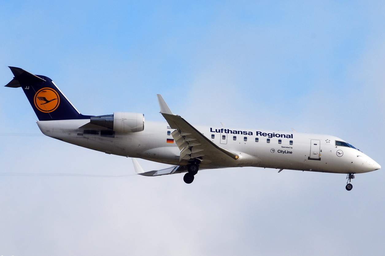 Photo prise à l'aéroport de Toulouse-Blagnac (LFBO) en France. Picture take at Toulouse-Blagnac Airport (LFBO) in France.